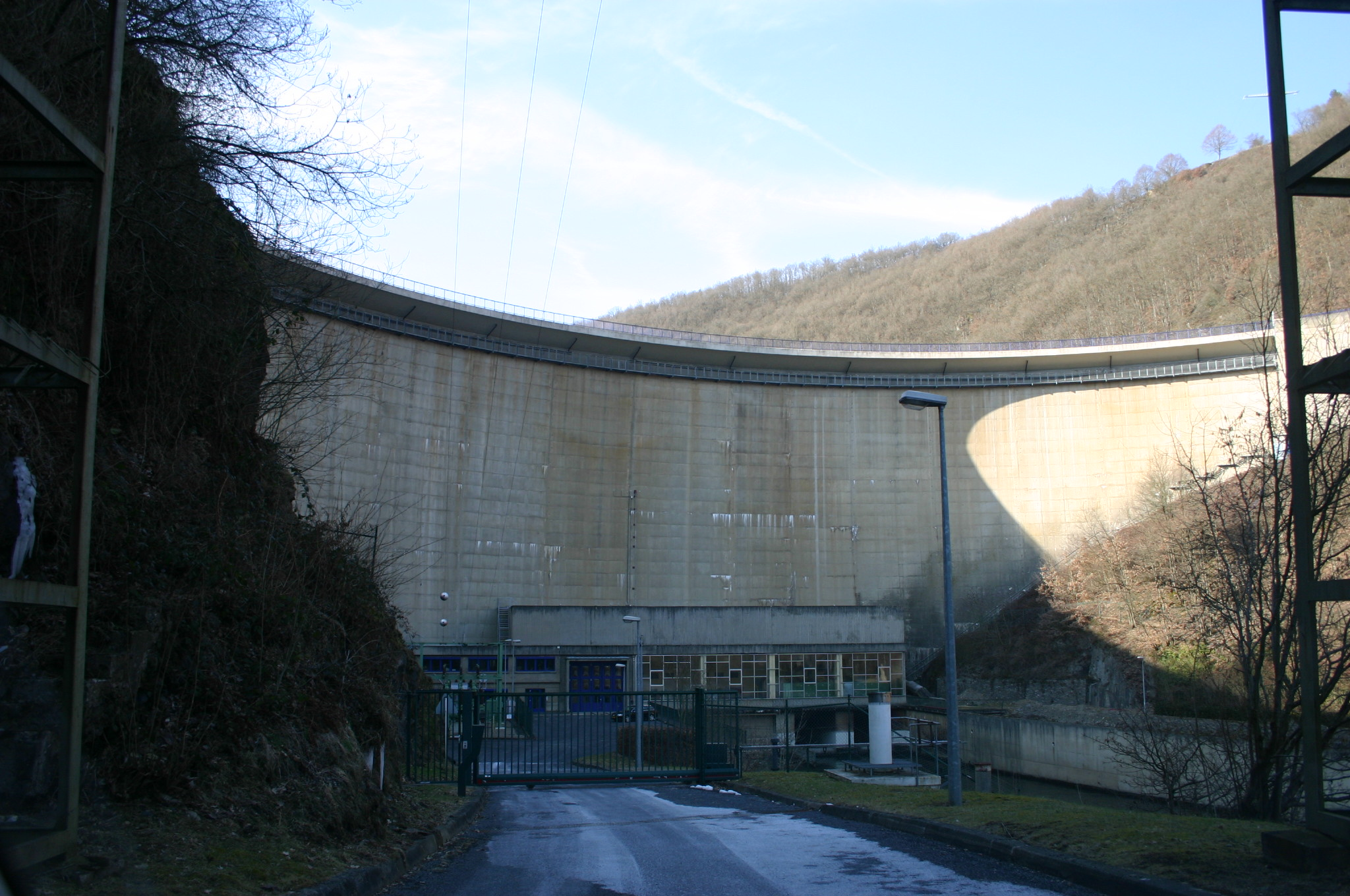 Le Barrage d'Esch-sur-SÃ»re en 2006 Auteur: Beideler RenÃ©